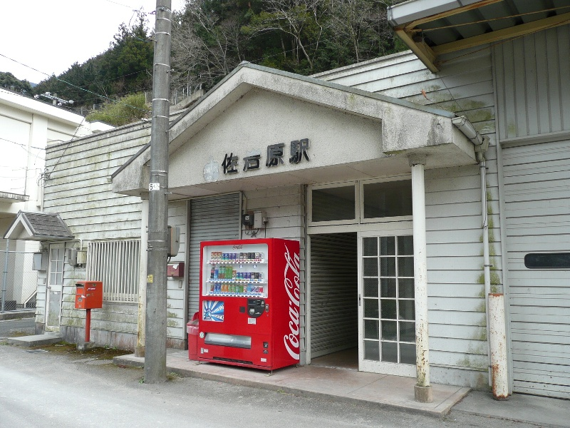 Tosa-Iwahara station